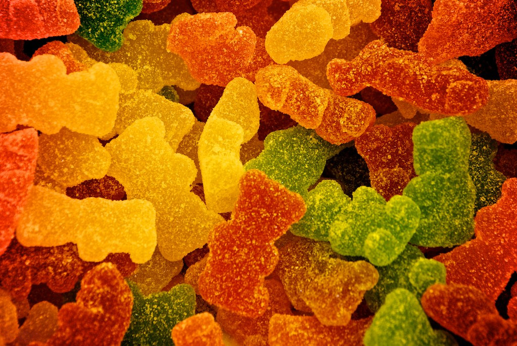 Ositos de gominola.